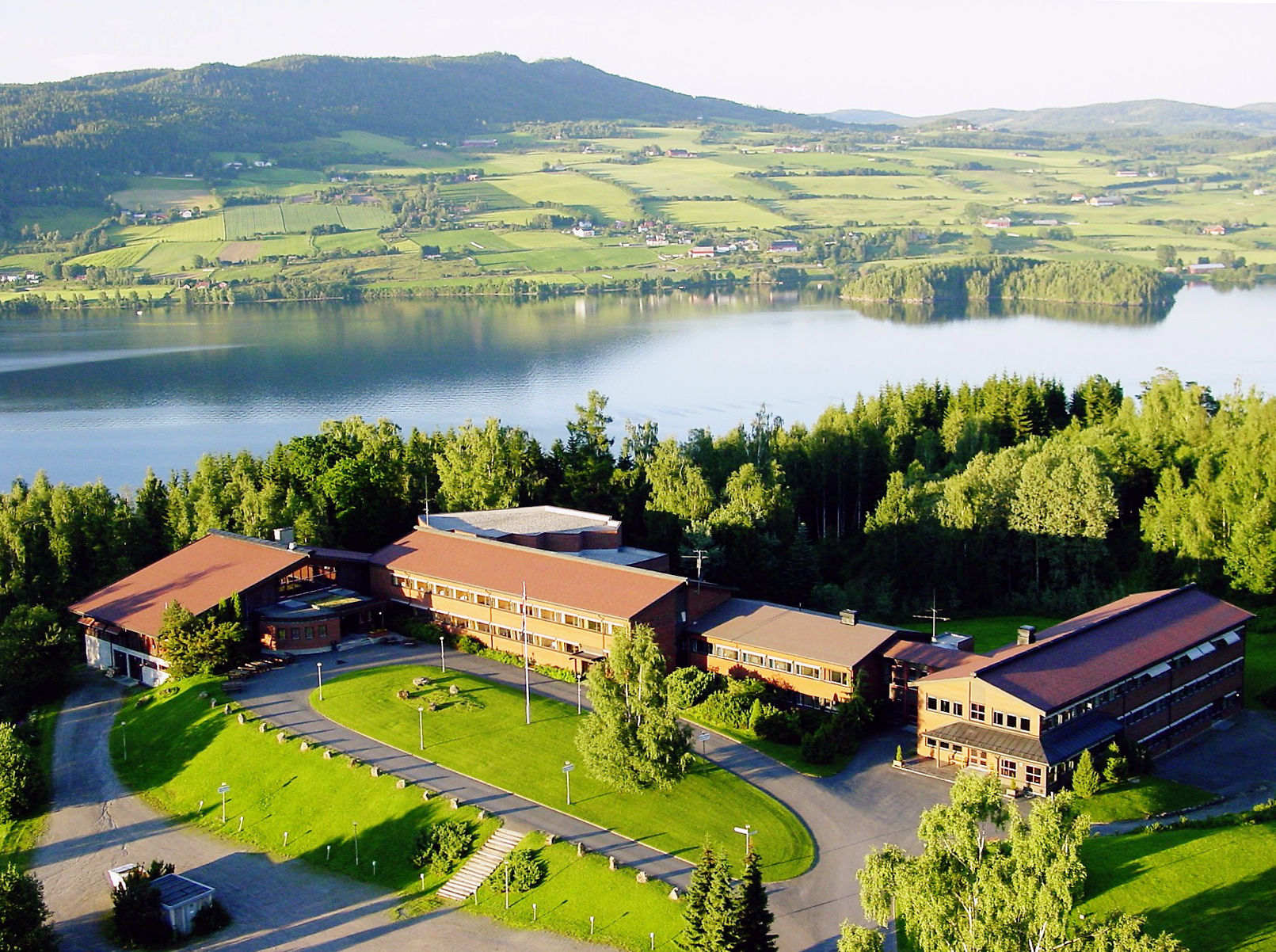 Foto: krediteres Scandicraft.